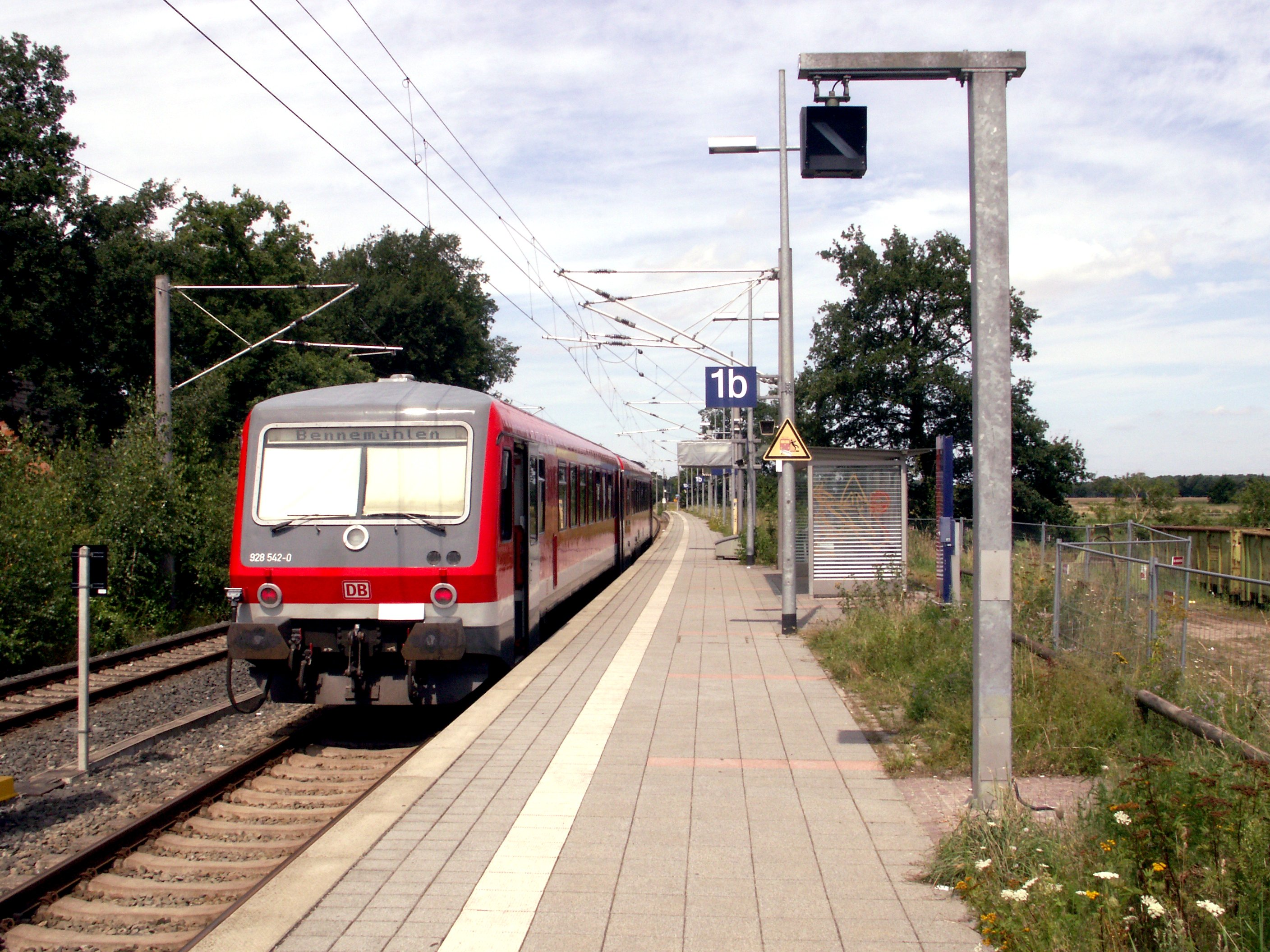 Bf Bennemühlen.